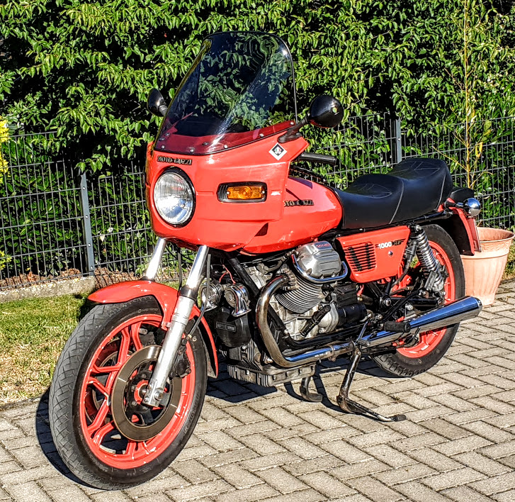 Moto Guzzi 1000 SP Produktionszeit 78 - 84 / Stückzahl 14.582 / 2 Zyl/OHV/2V / Hubraum 948,8 ccm / 61 PS/6500/min / % Gänge / ca. 180 km/h